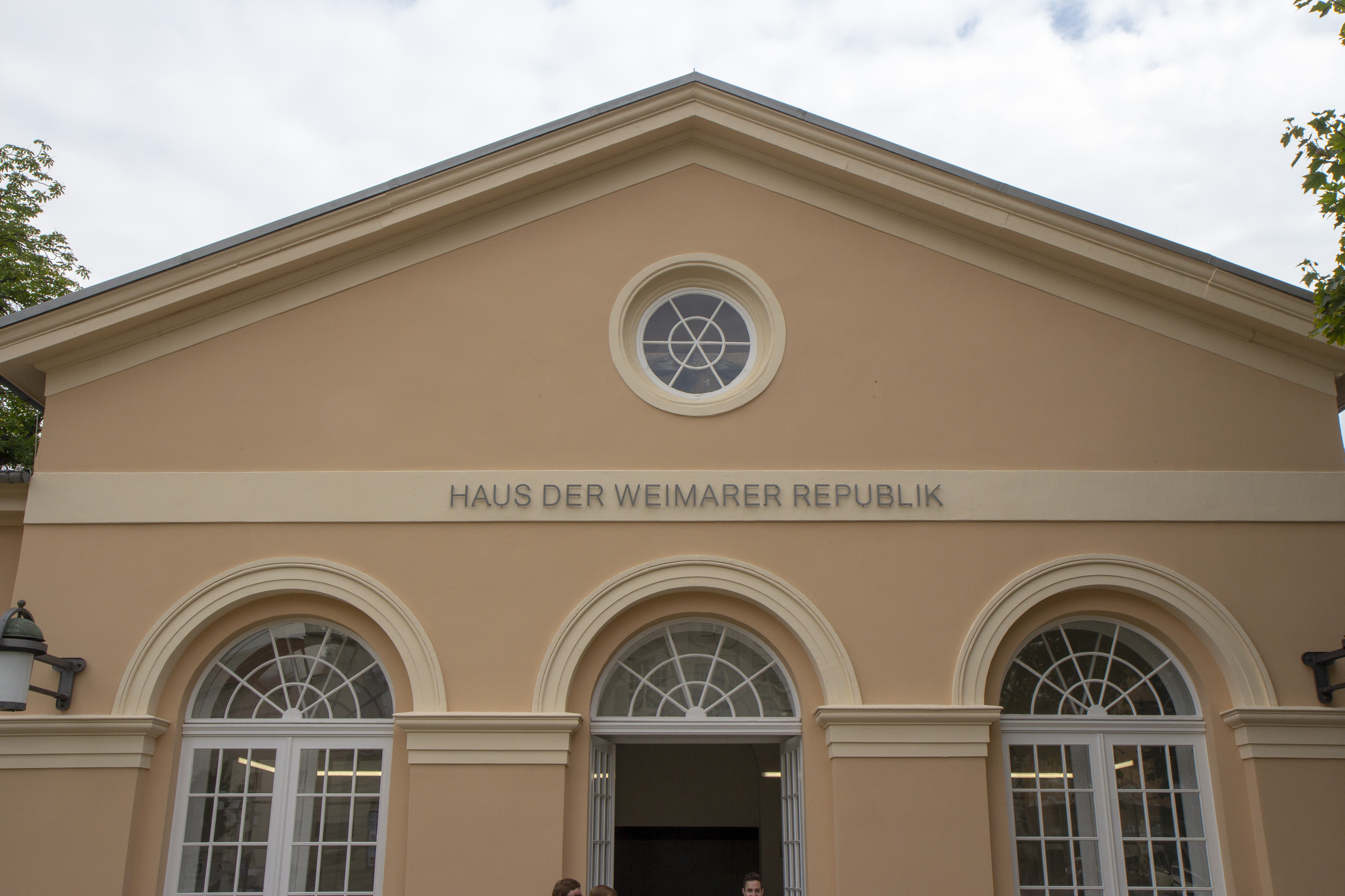 Haus der Weimarer Republik in Weimar. Fotos im Rahmen des Presserundgang am 30. Juli 2019.